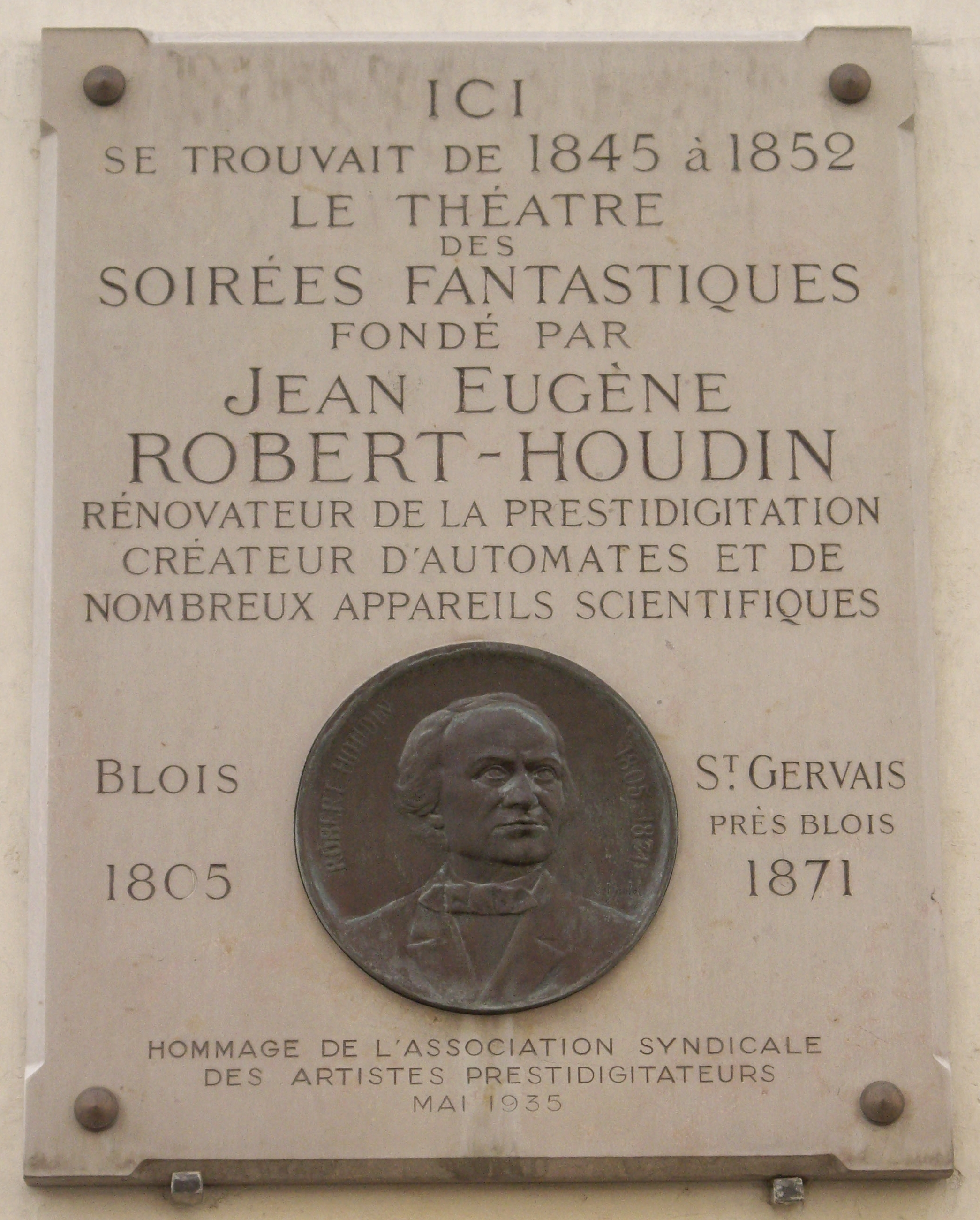 Plaque commémorative, 11 rue de Valois, Paris 1er.« Ici se trouvait, de 1845 à 1852, le Théâtre des soirées fantastiques fondé par Jean Eugène Robert-Houdin, rénovateur de la prestidigitation, créateur d'automates et de nombreux appareils scientifiques, Blois, 1805 – Saint-Gervais près Blois, 1871. Hommage de l'Association syndicale des artistes prestidigitateurs, mai 1935. »